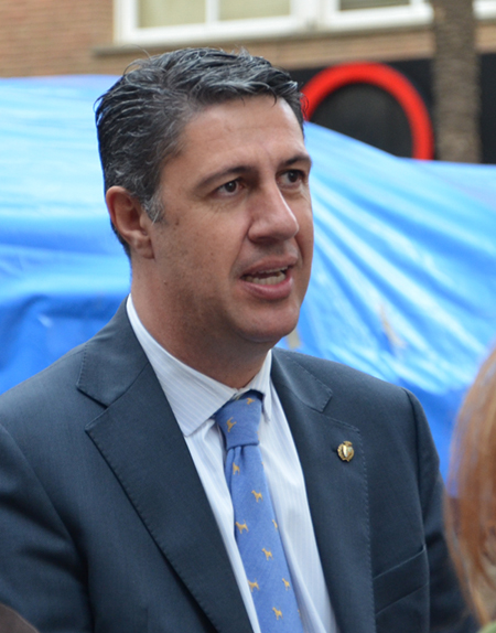 Xavier García Albiol (PP) a la Plaça de la Vila el dia de Sant Jordi de 2012.